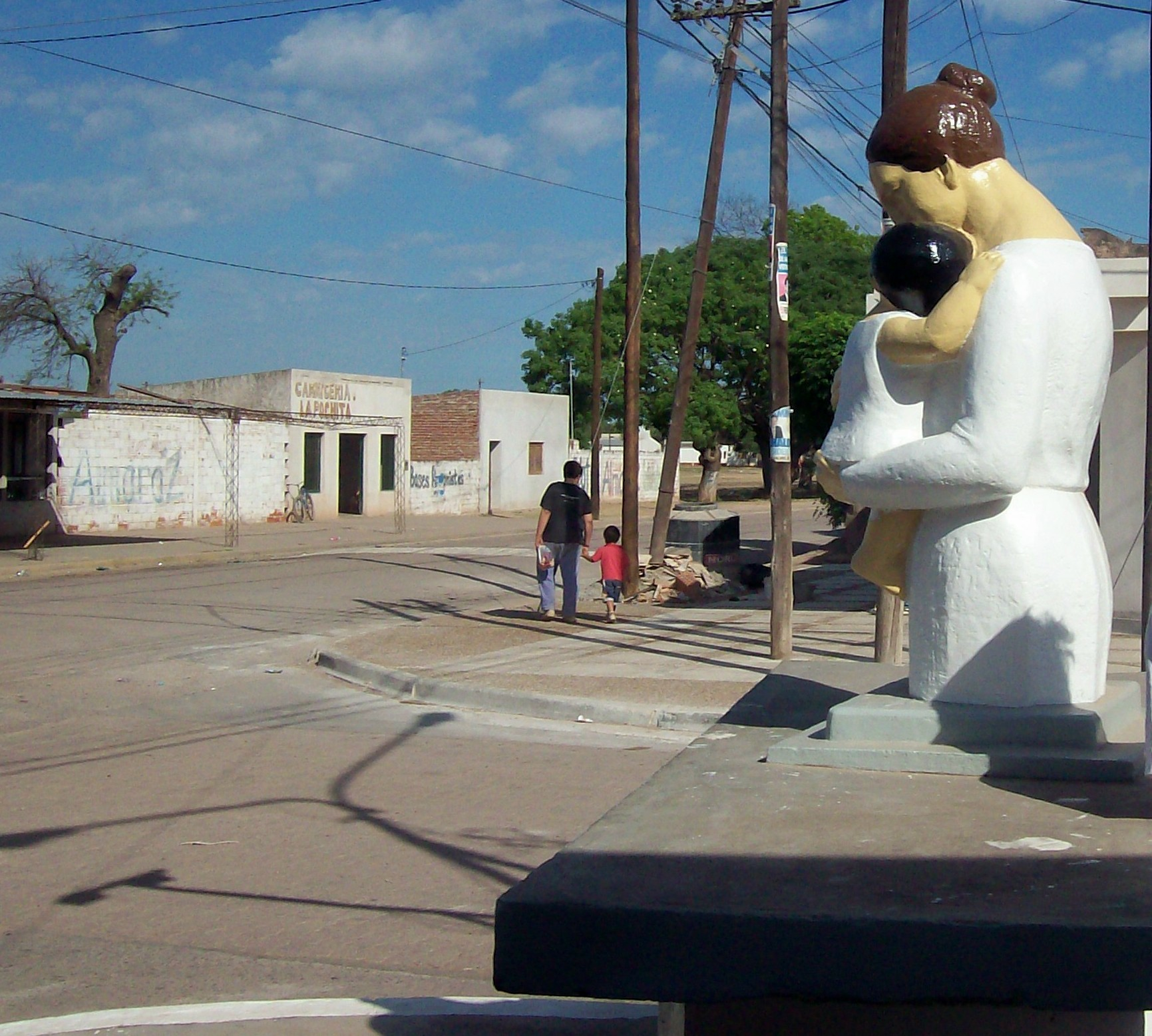 Localidad de Tintina, Departamento Moreno, Provincia de Santiago del Estero, República Argentina.